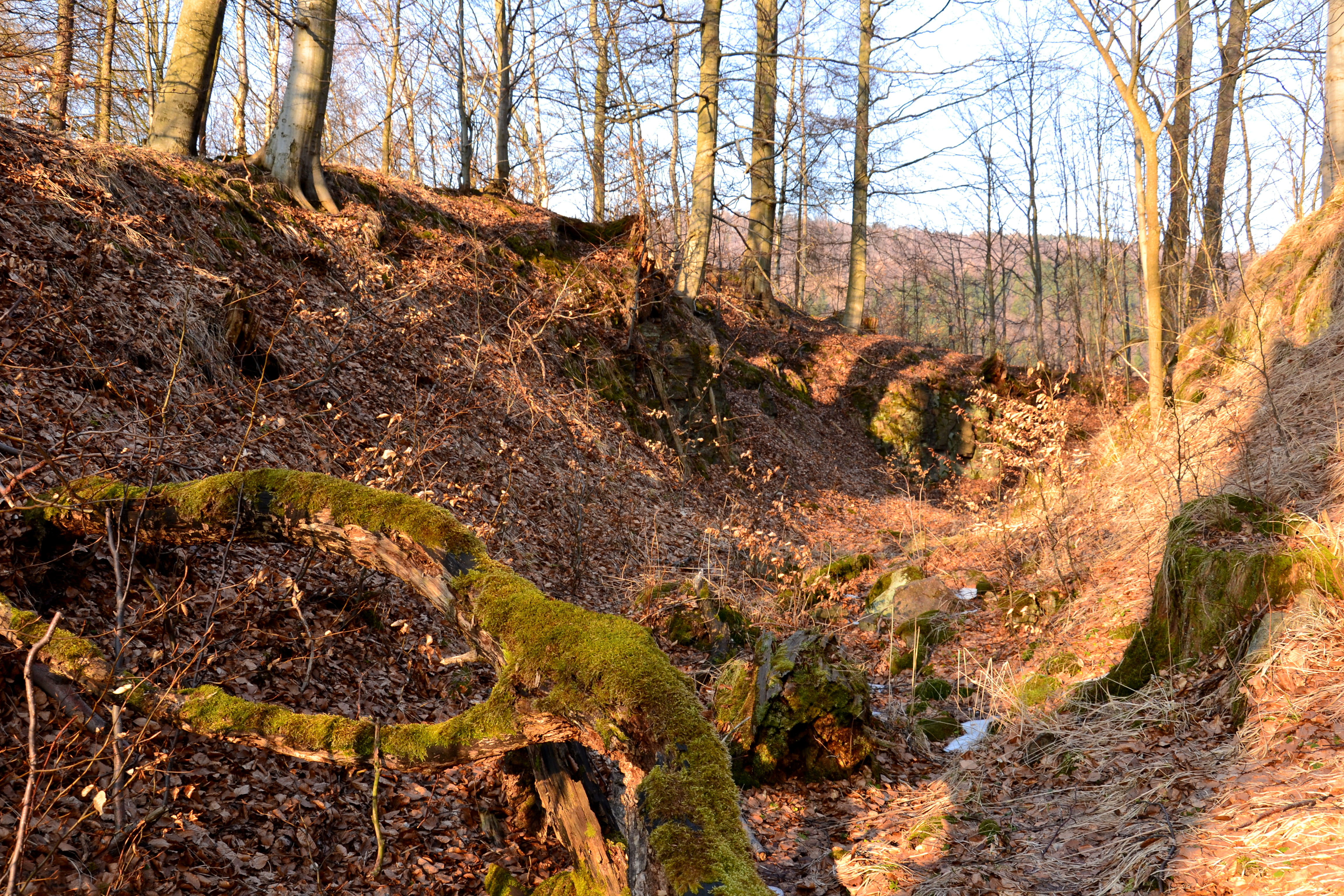 Ve skále vysekaný třetí příkop